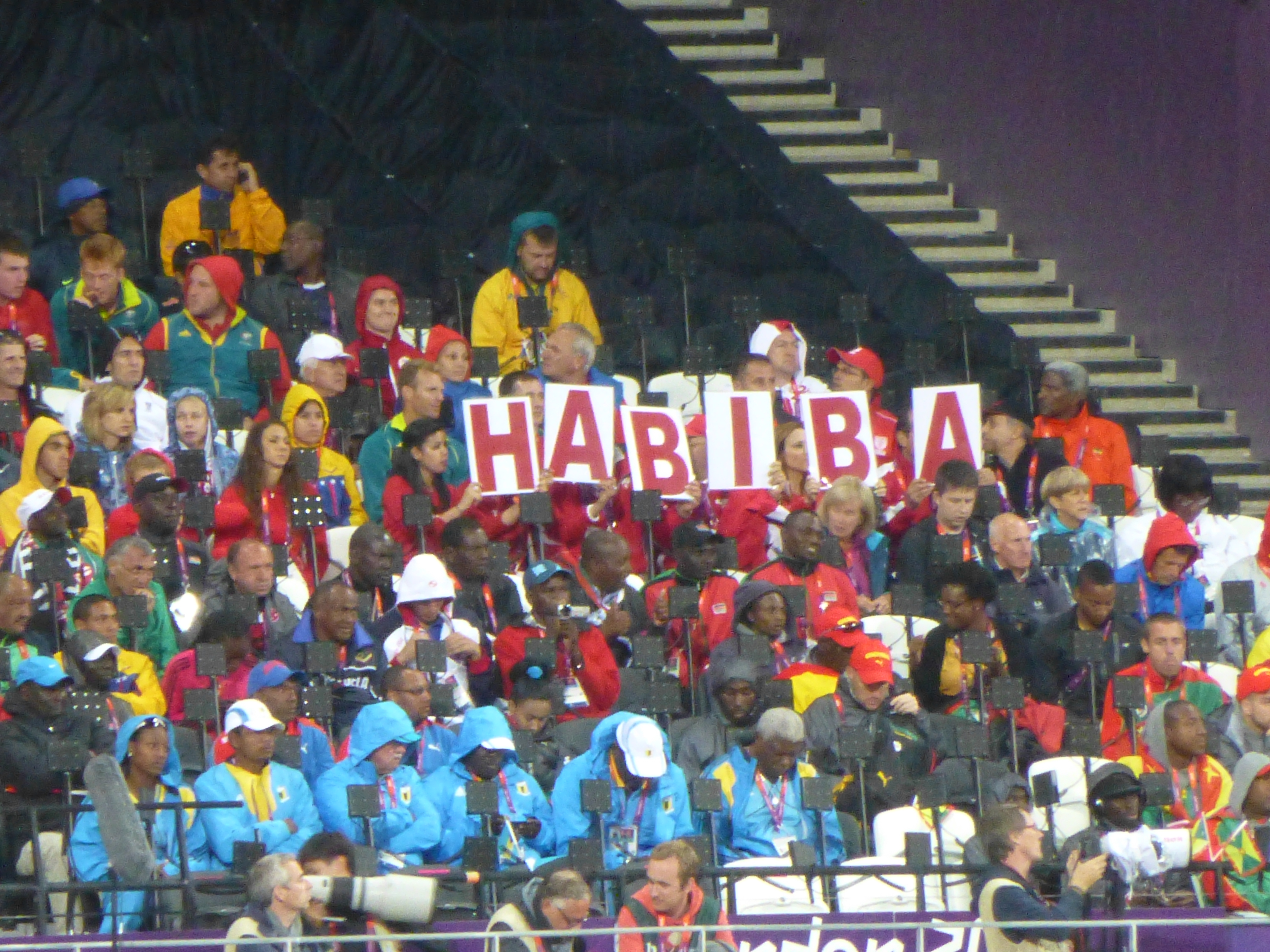 Les soutiens de Habiba Ghribi dans le stade olympique avant la course de 3000 mètres steeple.